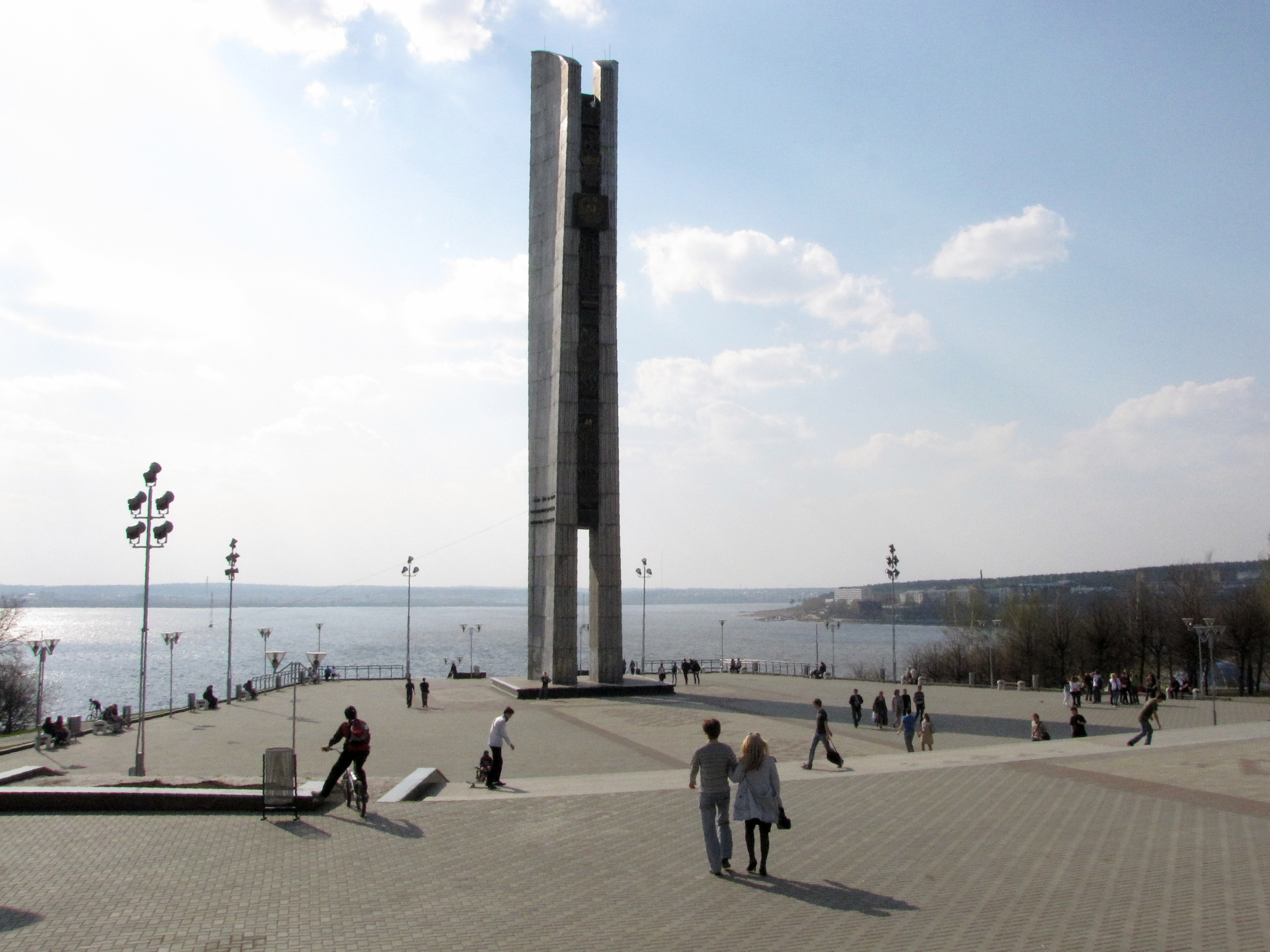 Монумент Дружбы народов